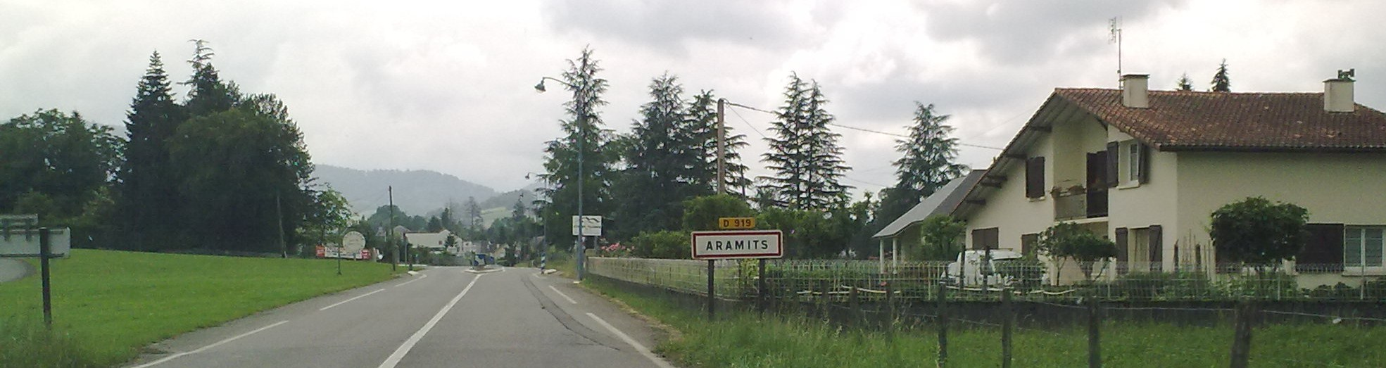 Aramits e 4 juillet 2010.